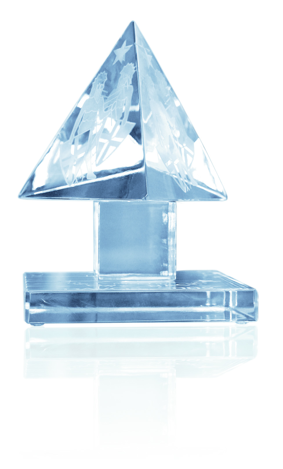 Auszeichnung für Gewinnerinnen und Gewinner der Internationalen Sportnacht Davos.